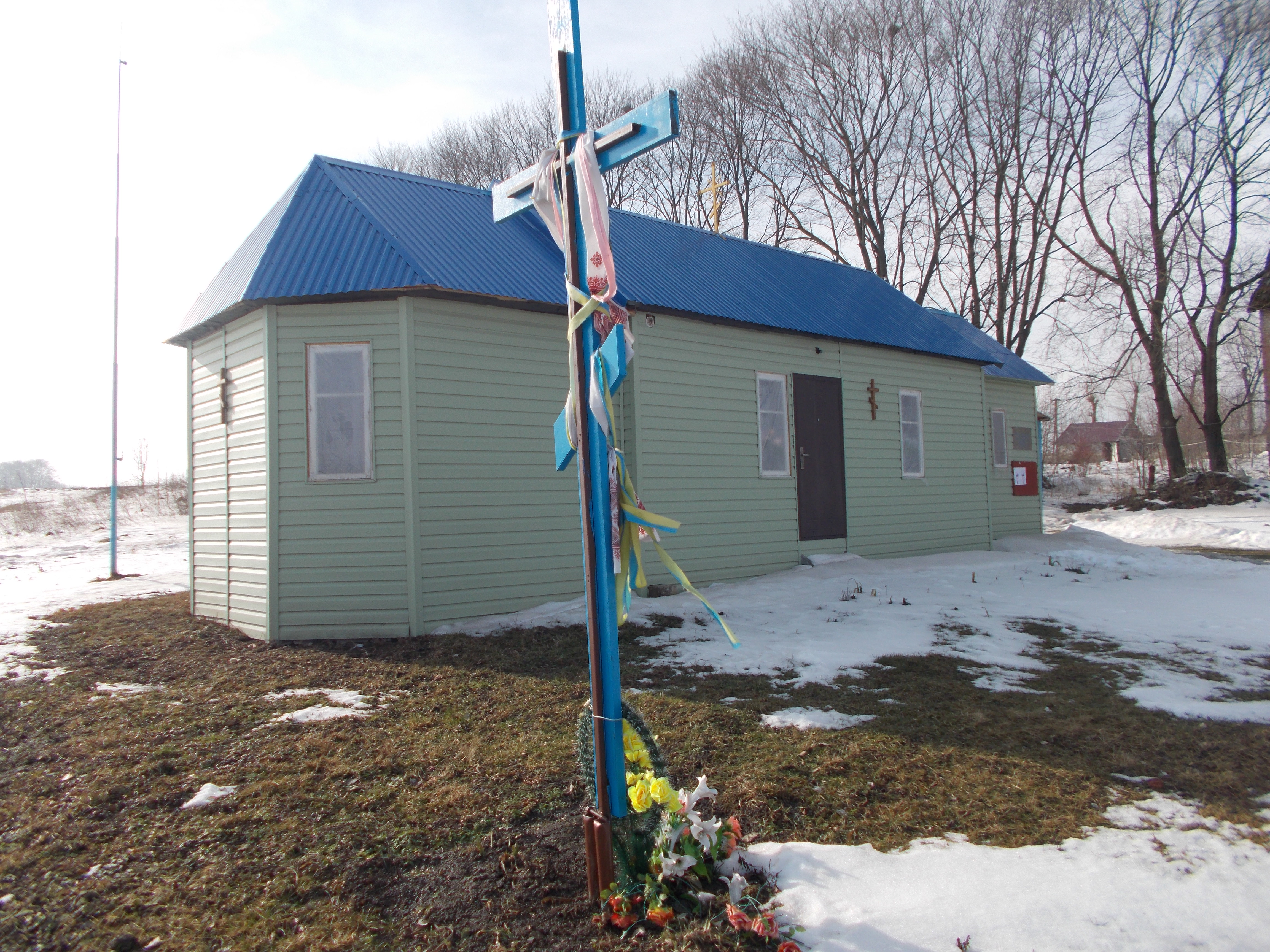 Капличка Святопокровської парафії Київського патріархату